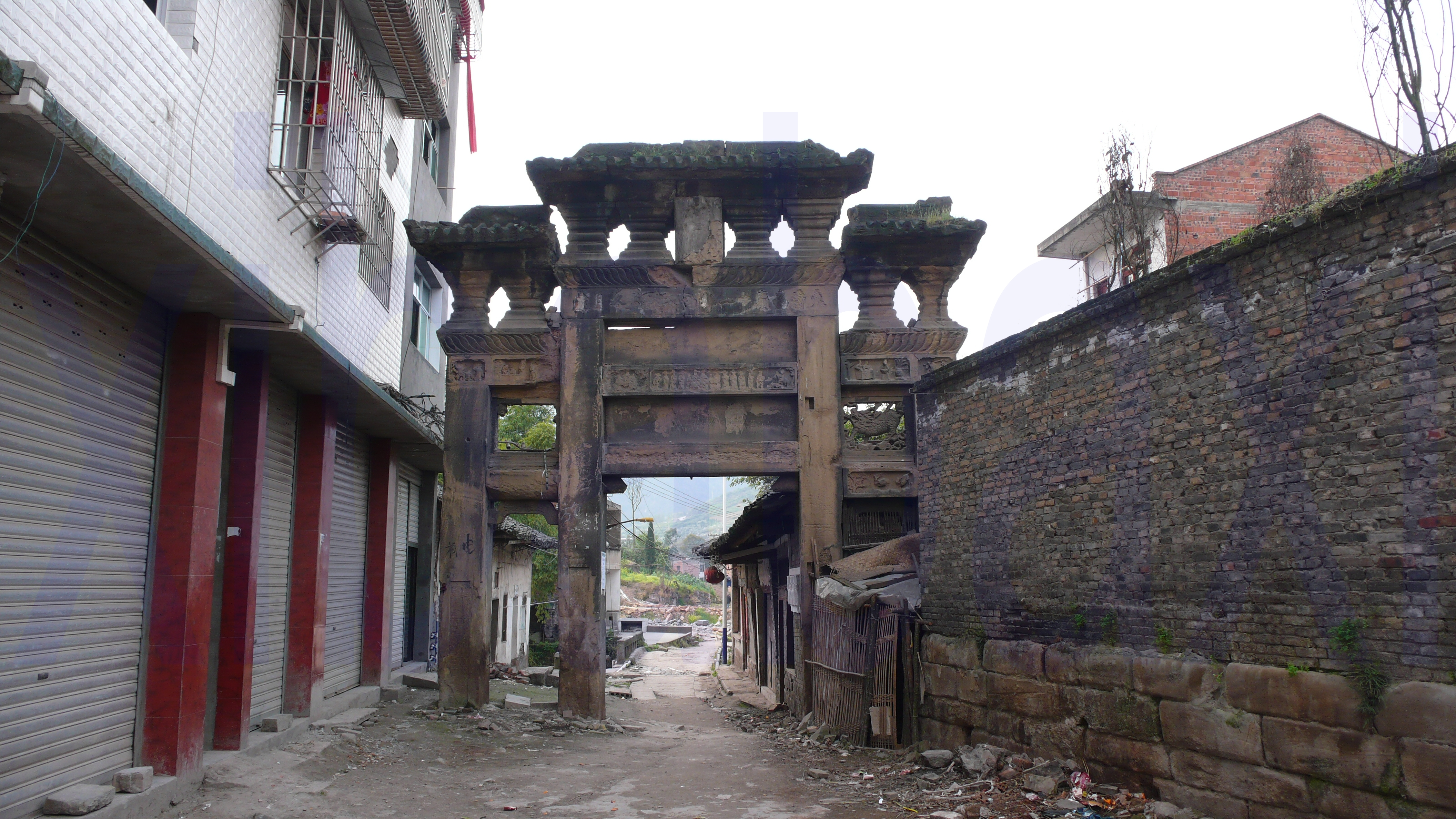 中文（台灣）: 璧山縣八塘牌坊